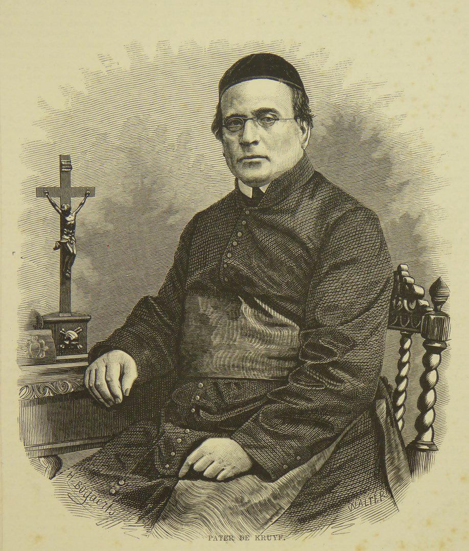 Pater de Kruyf (1813-1874), gravure J. Walter (coll. Catharijne Convent)